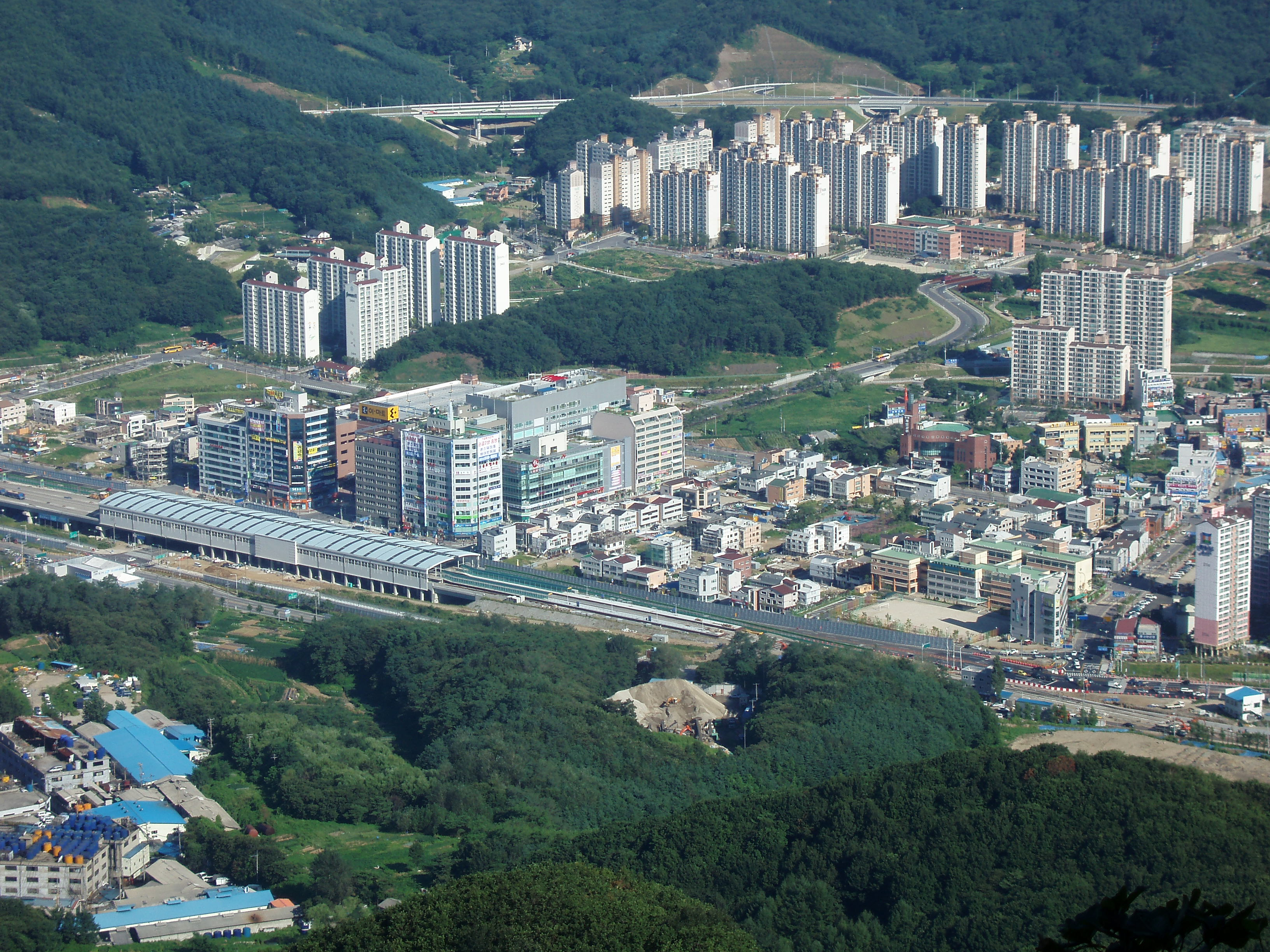 Ho-pyeong Village